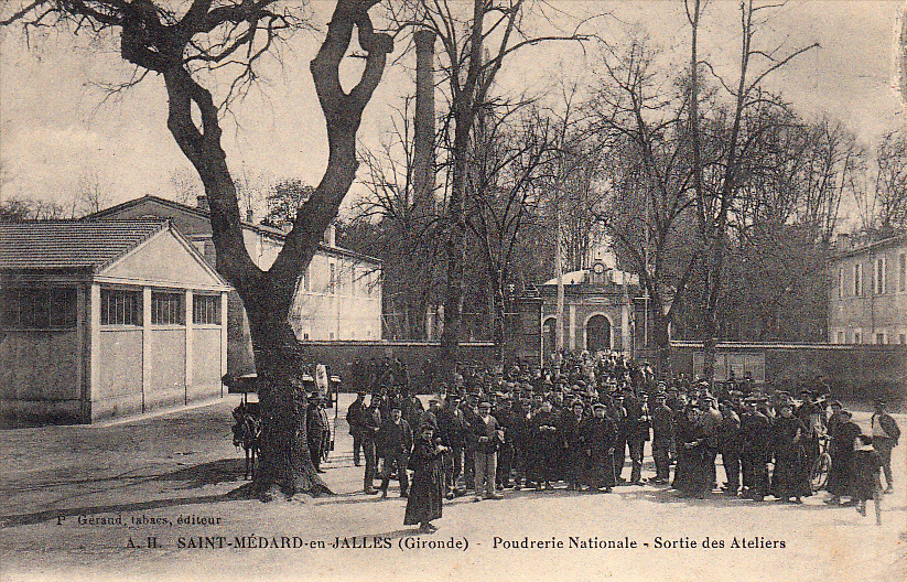 L'entrée de la poudrerie, Saint-Médard-en-Jalles.